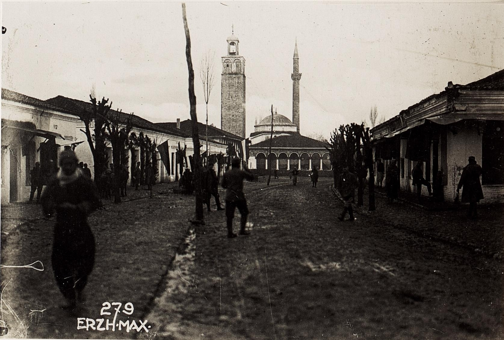 Hauptstrasse in Tirana.